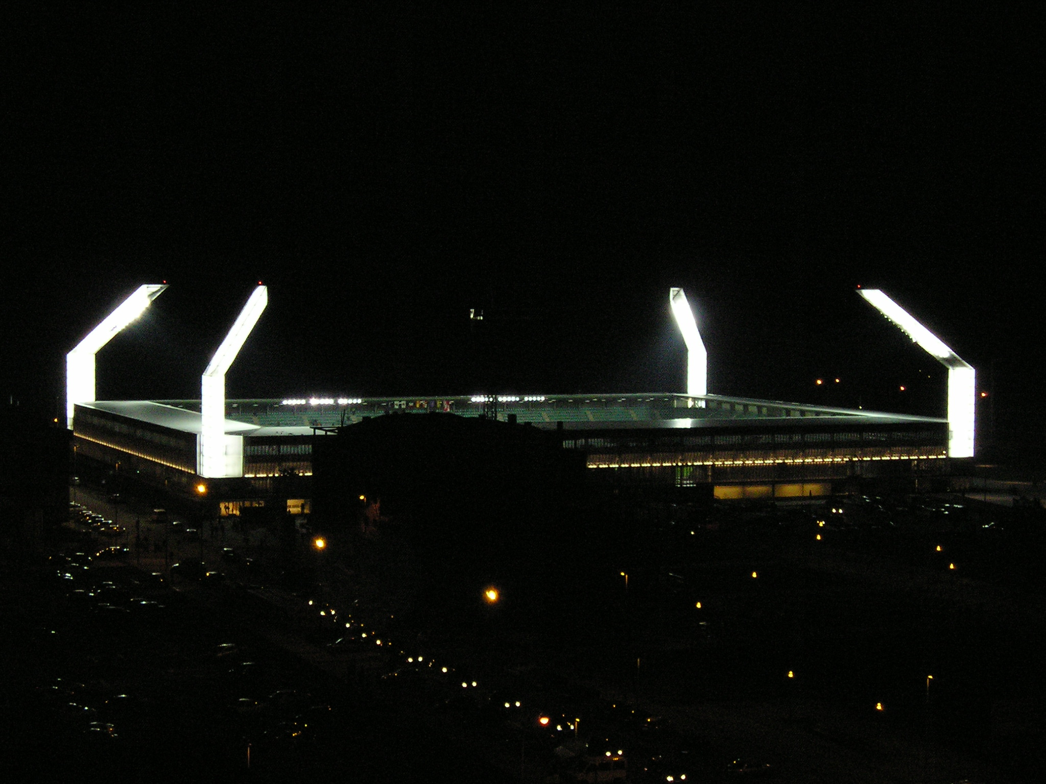 Estadio Nueva Balastera de Palencia de noche.